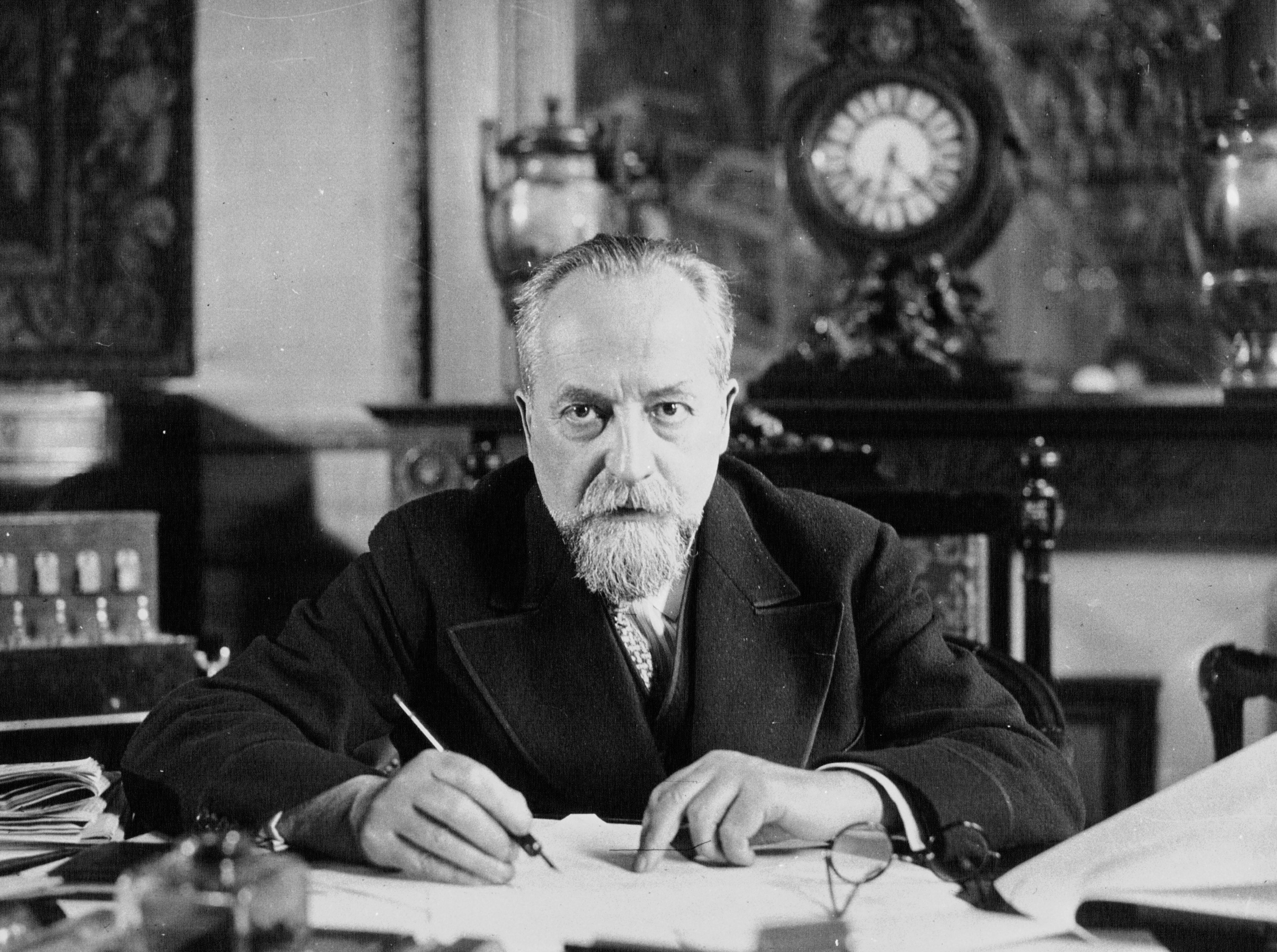 M. Julien Durand, ministre du commerce à son bureau : photographie de presse